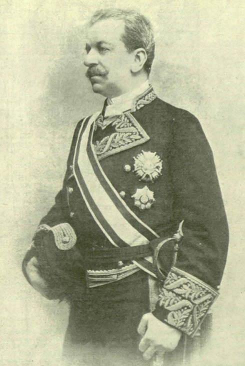 Excmo, Sr. D. Gonzalo de Saavedra y Cueto, falleció en Madrid el 13 del corriente